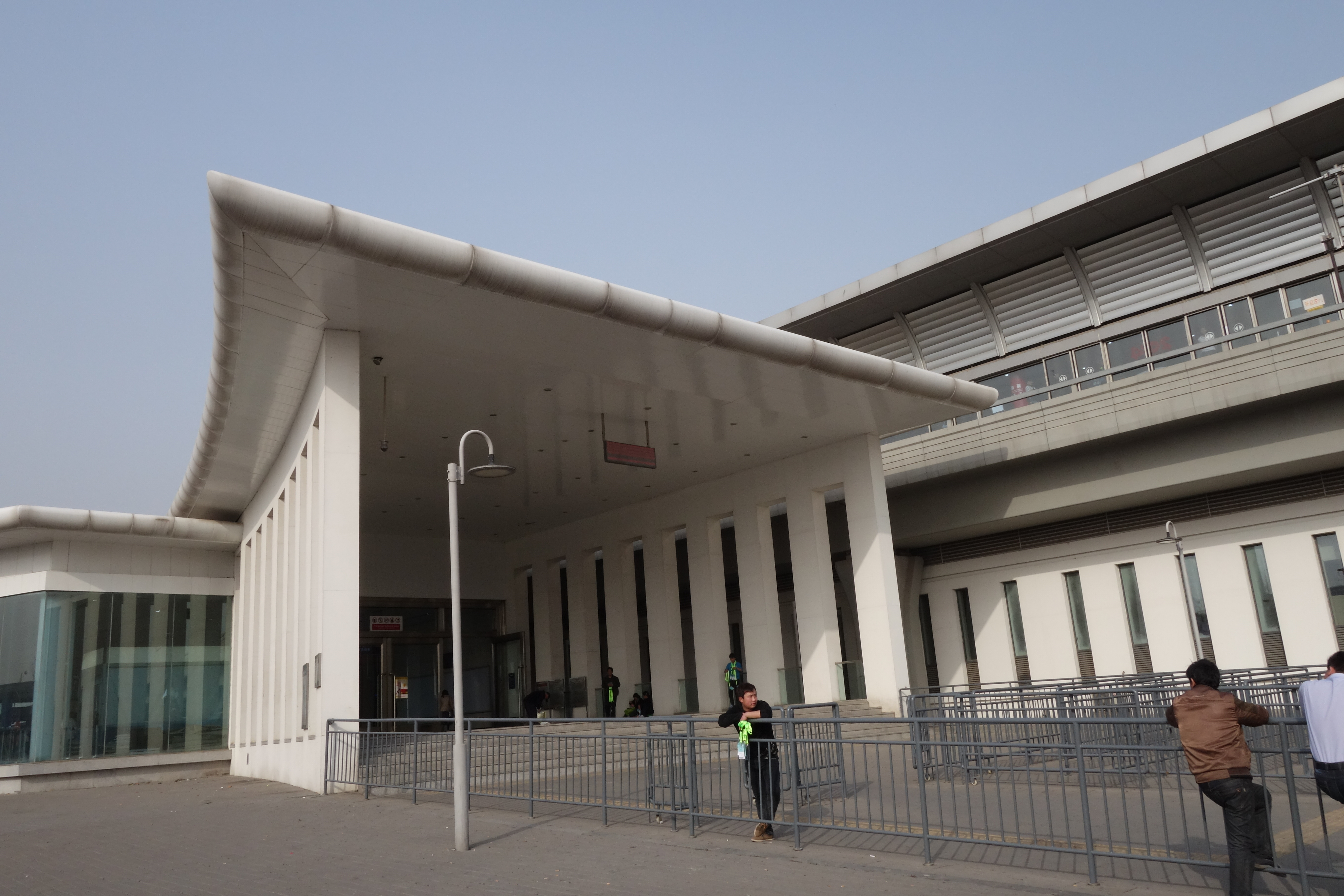 国展站D口